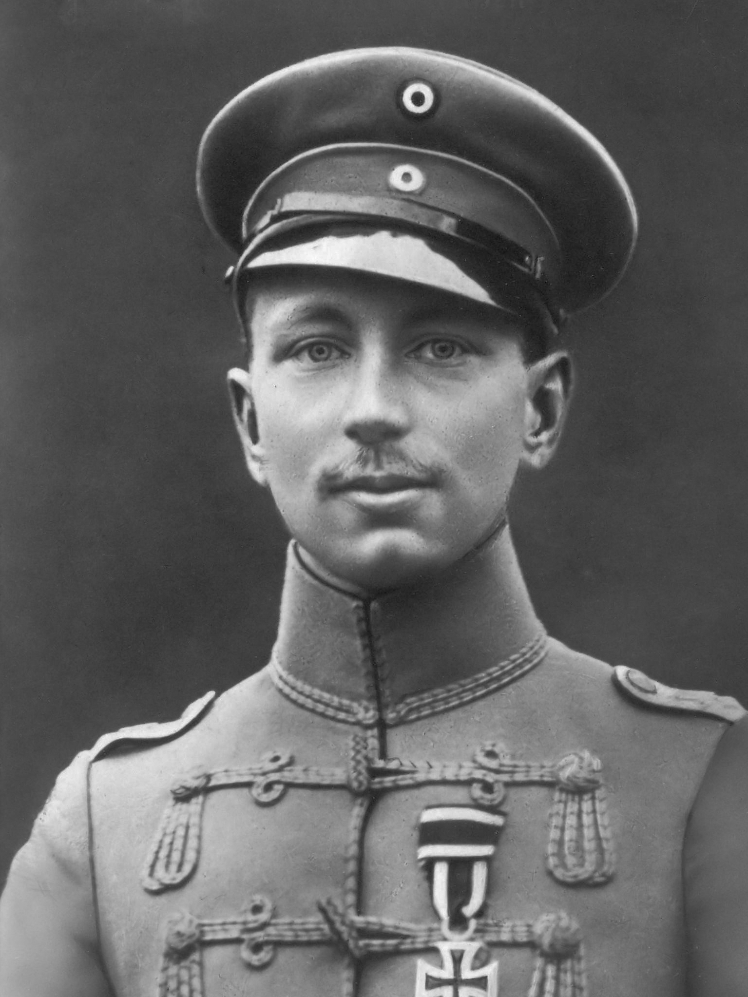 Prinz Joachim von Preussen 1914-1918